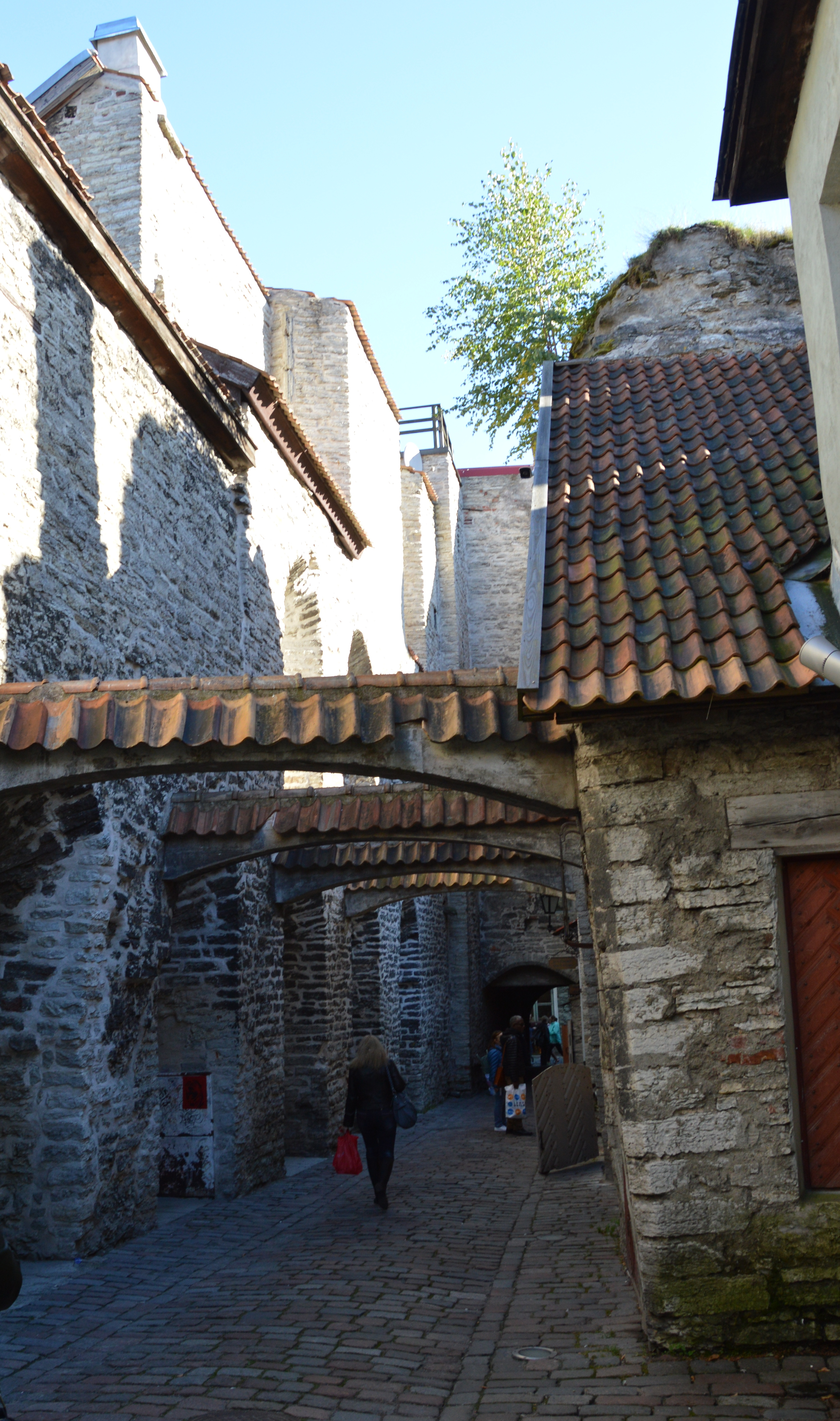 Katharinengang Tallinn